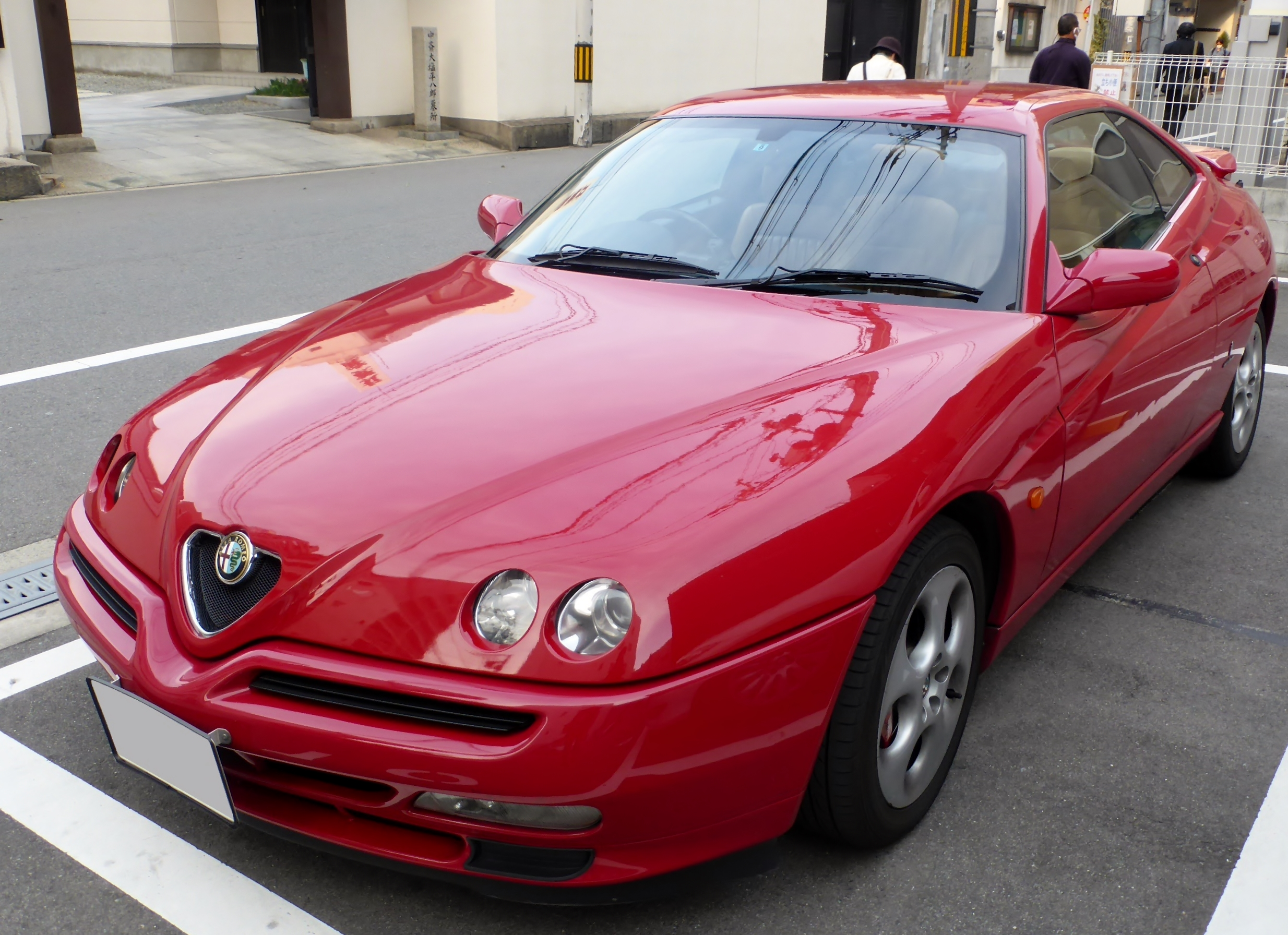 アルファ・ロメオGTV 3.0 V6 24Vをフロントから撮影。